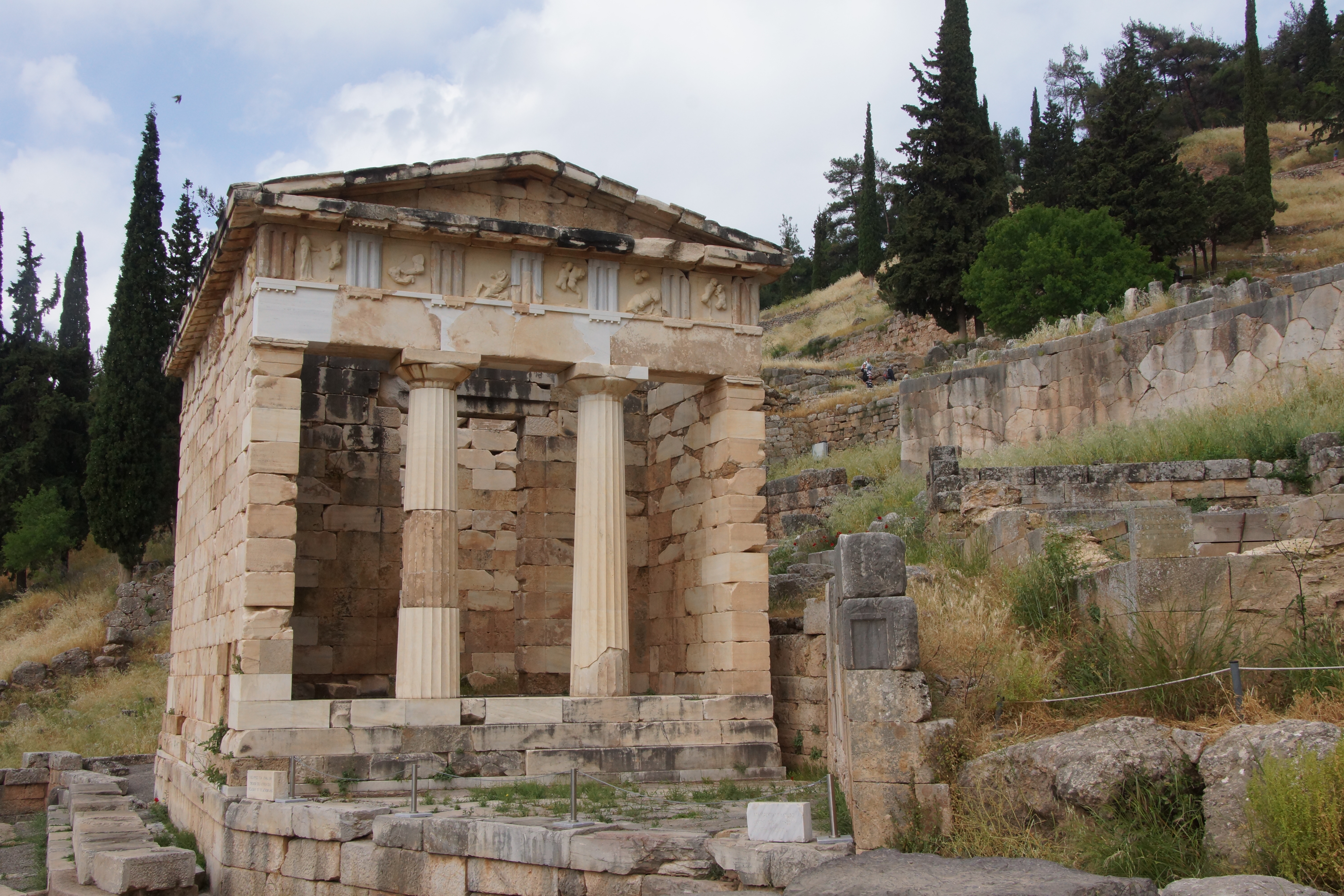 GRIEKENLAND 014